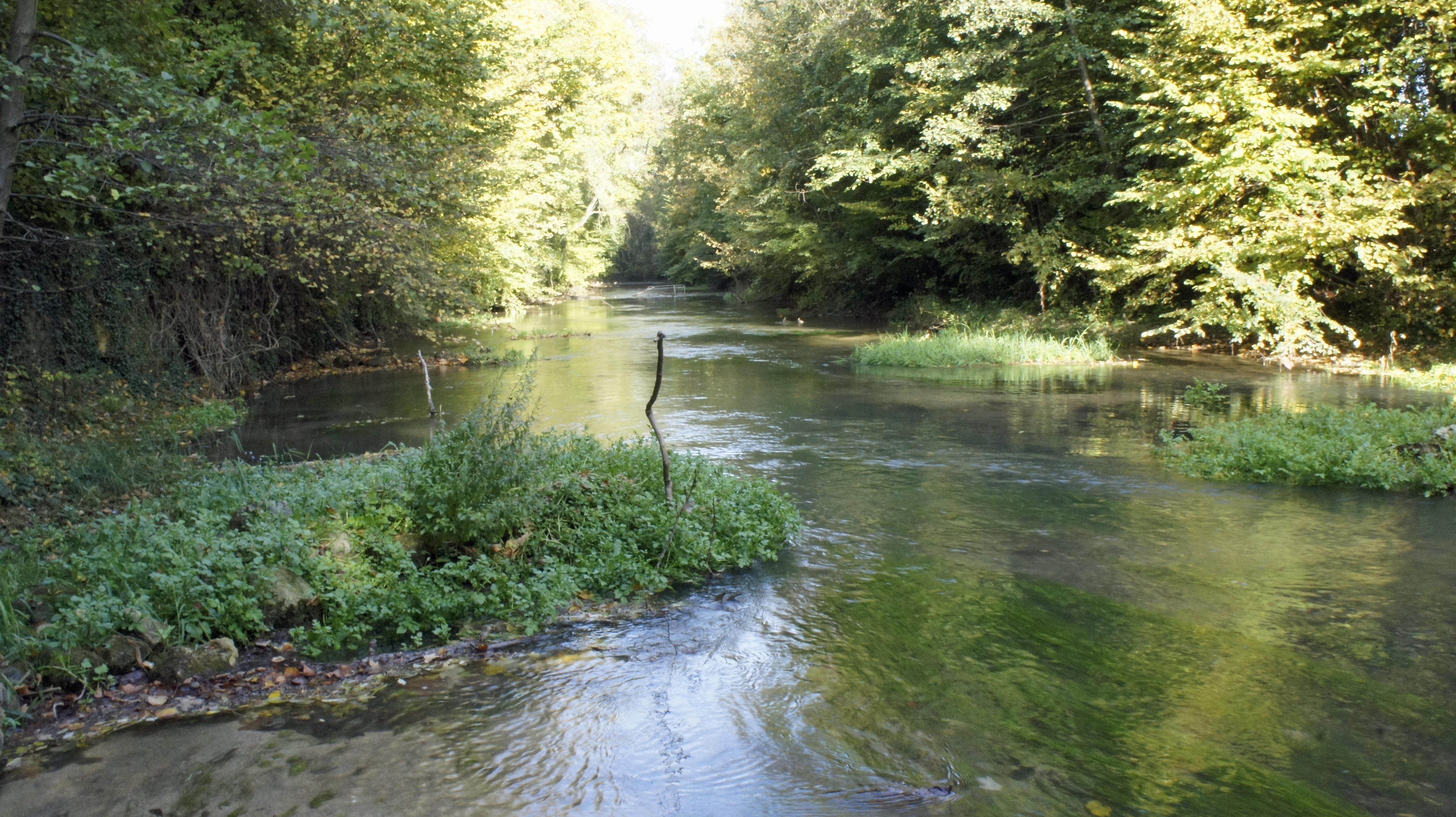 Une vue de la Vesle à la hauteur de Sillery.